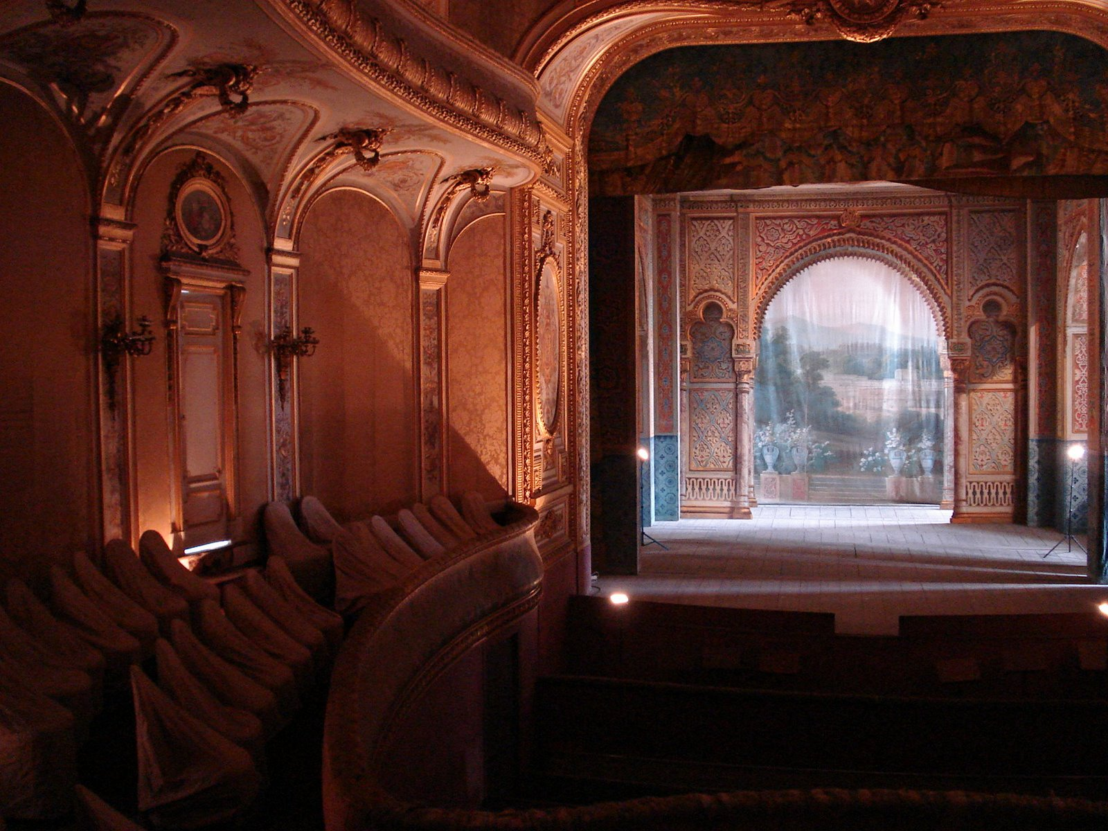 Schloss Fontainebleau, Theater